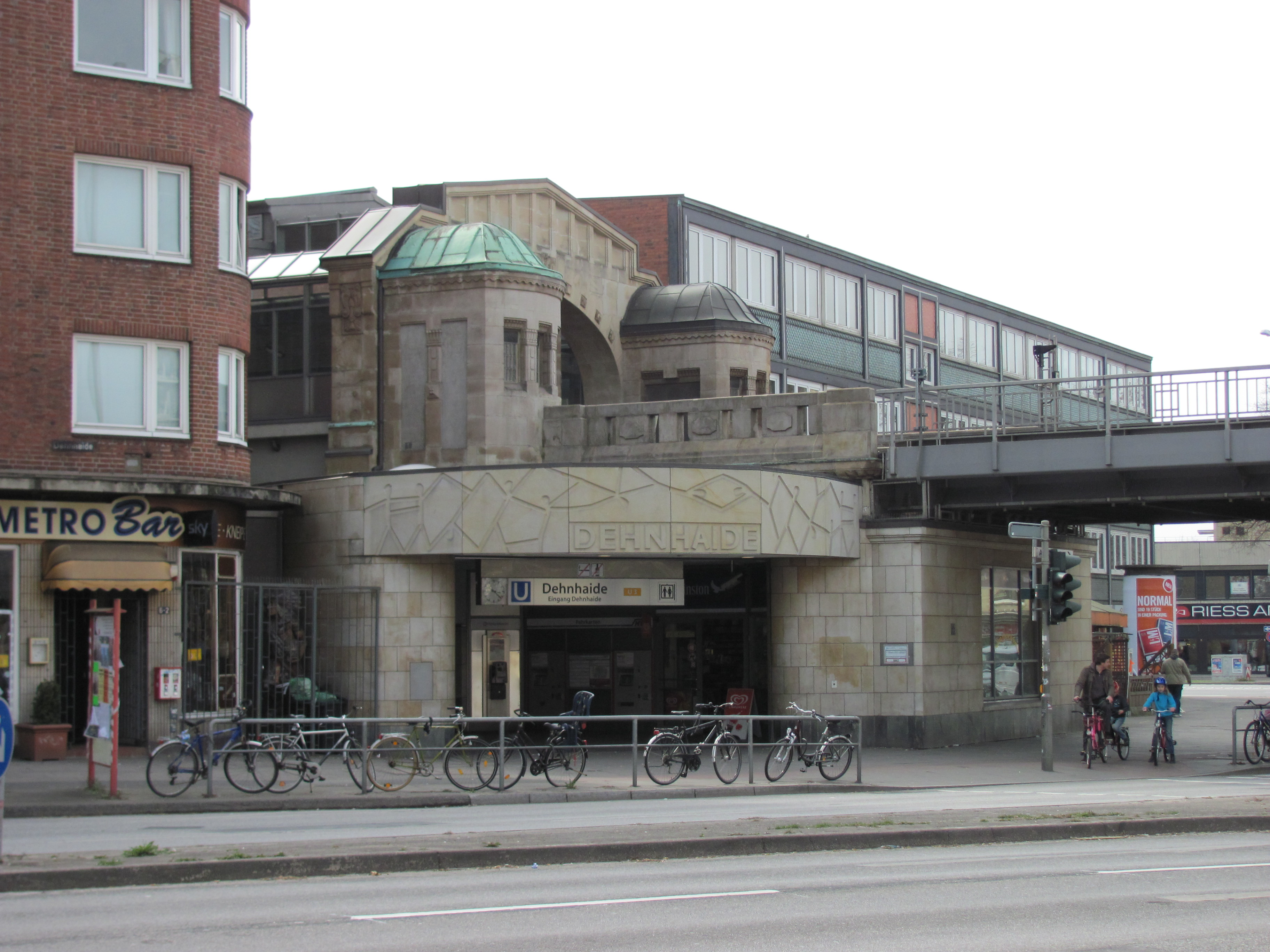 Eingang des U-Bahnhofs Dehnhaide